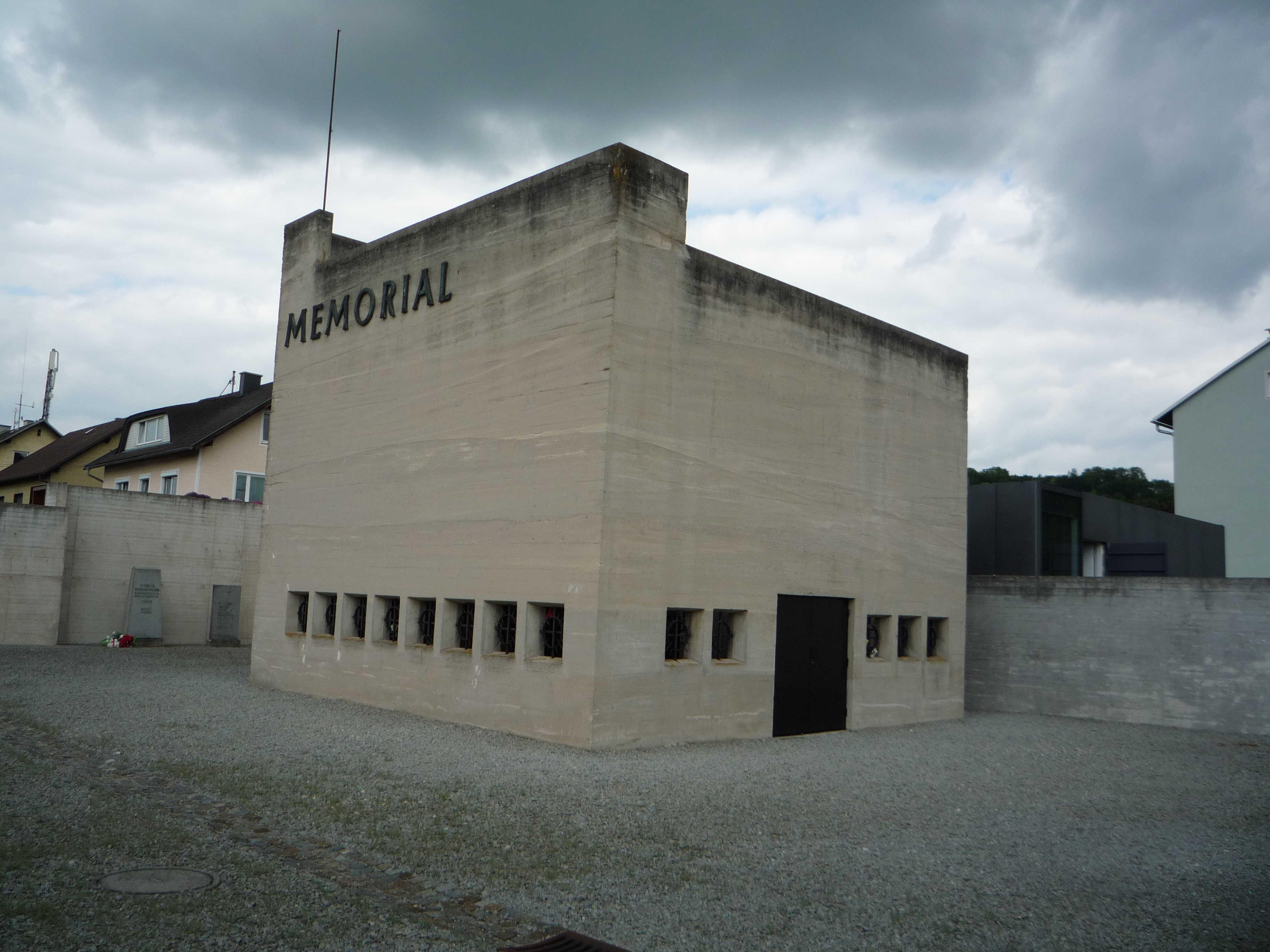 Ce monument se trouve dans l'ancien Camp de concentration de Gusen, en Autriche.